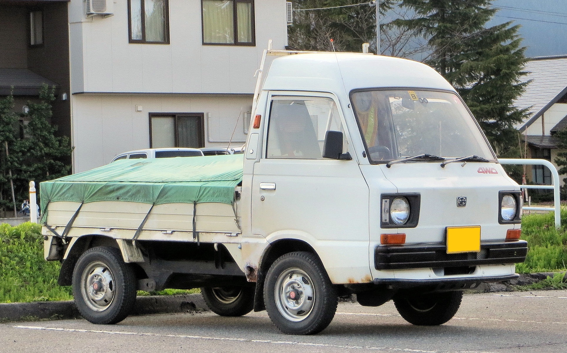 スバルサンバー4WD ハイルーフ